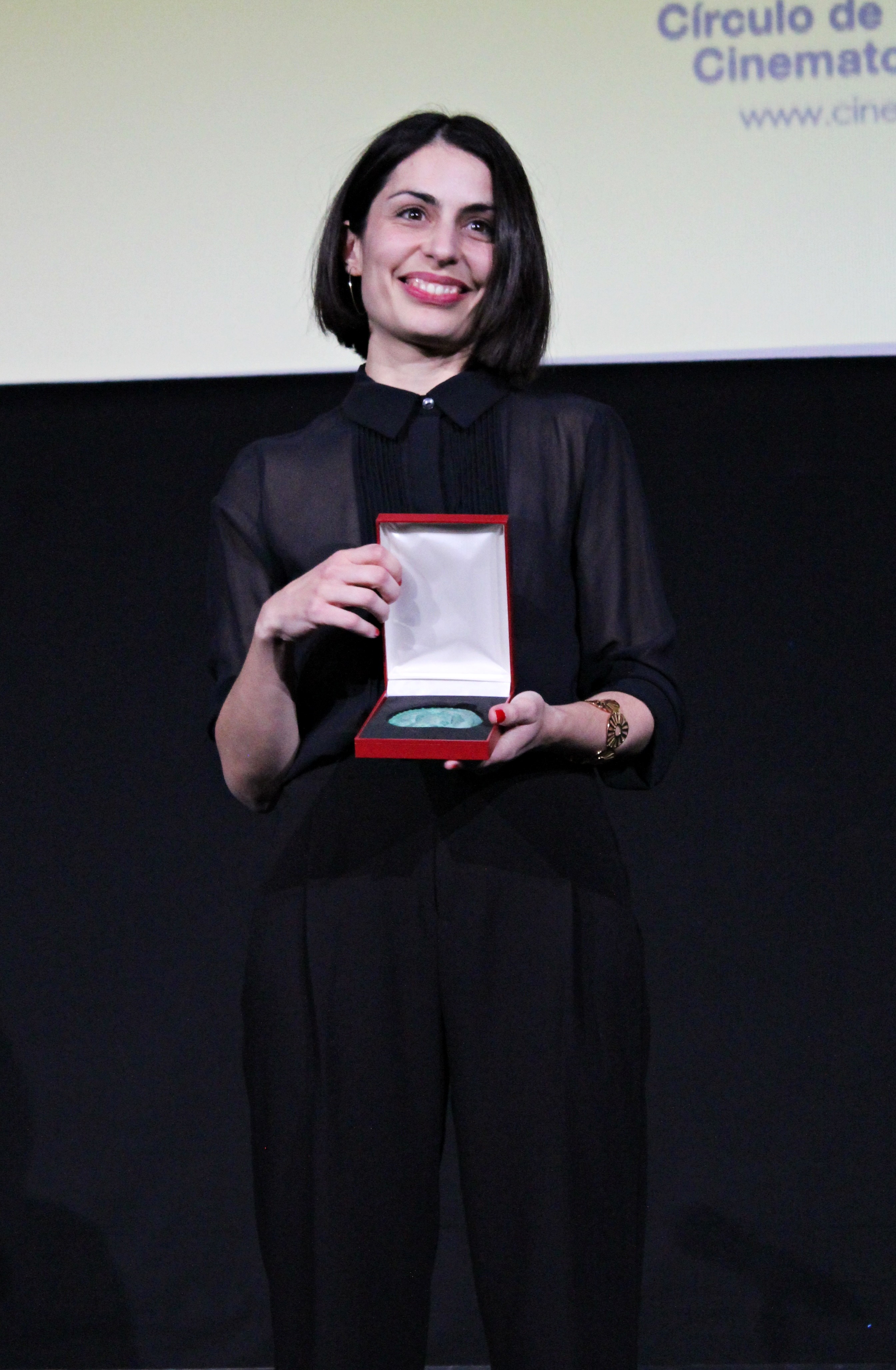 La directora de cine española Celia Rico muestra la Medalla del Círculo de Escritores Cinematográficos a directora revelación por su película Viaje al cuarto de una madre.